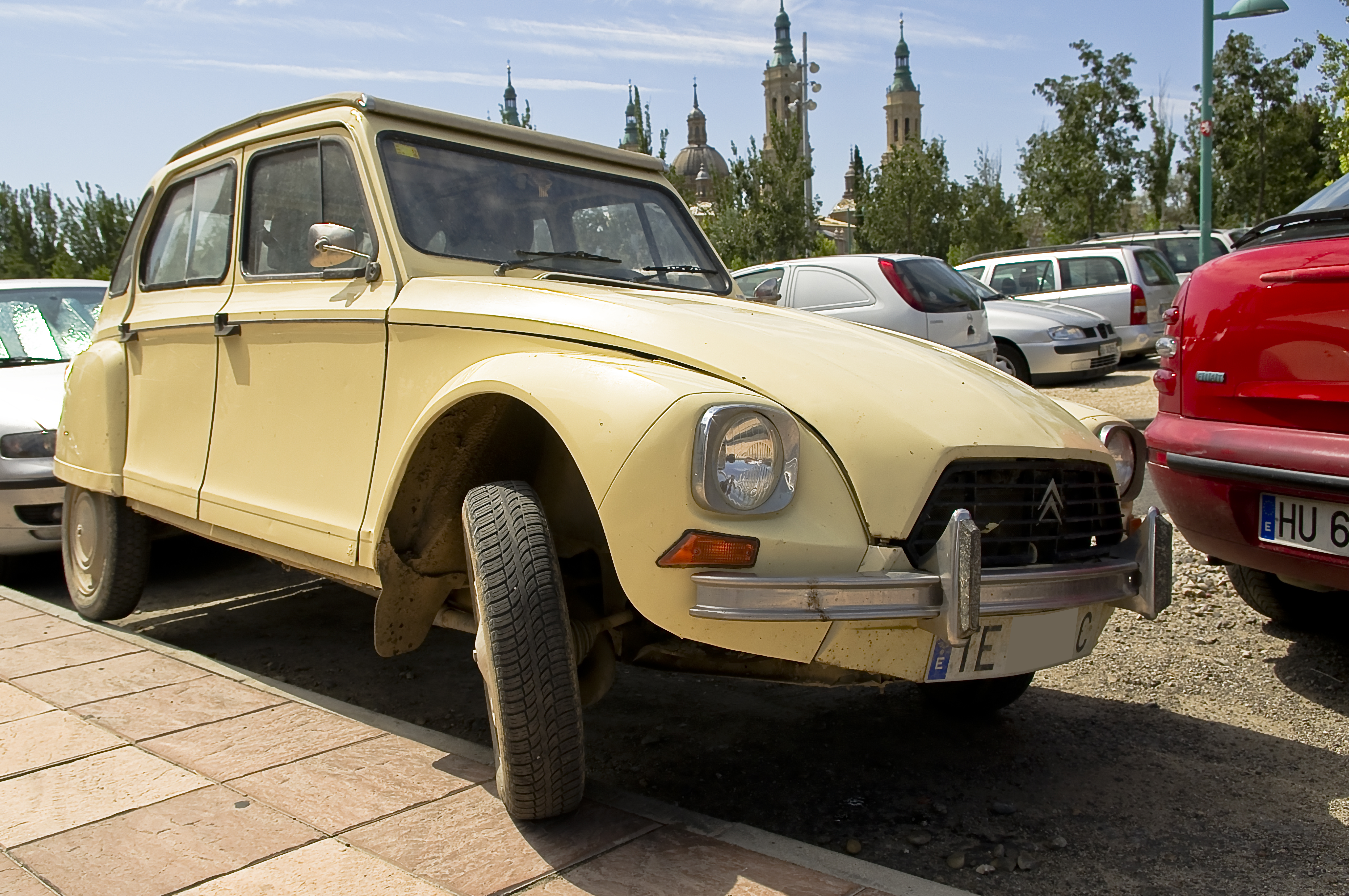 1981 Citroën Dyane